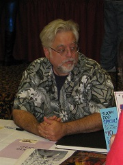 Chuck Dixon